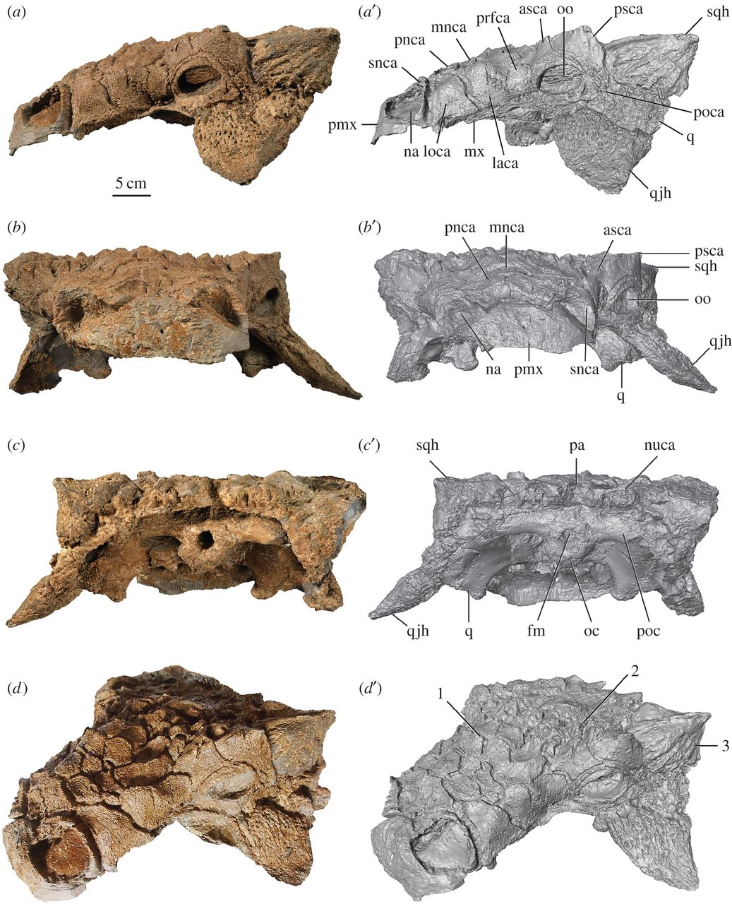 Holotype of Zuul crurivastator, ROM 75860, skull in (a) left lateral, (b) anterior, (c) posterior and (d) oblique left anterodorsal views. (a′–d′) are digital models of the skull. Diagnostic characters for Z. crurivastator include (1) imbricated frontonasal caputegulae, (2) peaked, pyramidal prefrontal and middle supraorbital caputegulae and (3) prominent apicobasal furrows on the squamosal horns. Abbreviations are as follows: asca, anterior supraorbital caputegulum; fm, foramen magnum; laca, lacrimal caputegulum; loca, loreal caputegulum; mnca, median nasal caputegulum; mx, maxilla; na, external naris; nuca, nuchal caputegulum; oo, ocular osteoderm; oc, occipital condyle; pa, parietal; pmx, premaxilla; pnca, postnarial caputegulum; poc, paroccipital process; poca, postocular caputegulum; prfca, prefrontal caputegulum; psca, posterior supraorbital caputegulum; q, quadrate; qjh, quadratojugal horn; snca, supranarial caputegulum; sqh, squamosal horn.